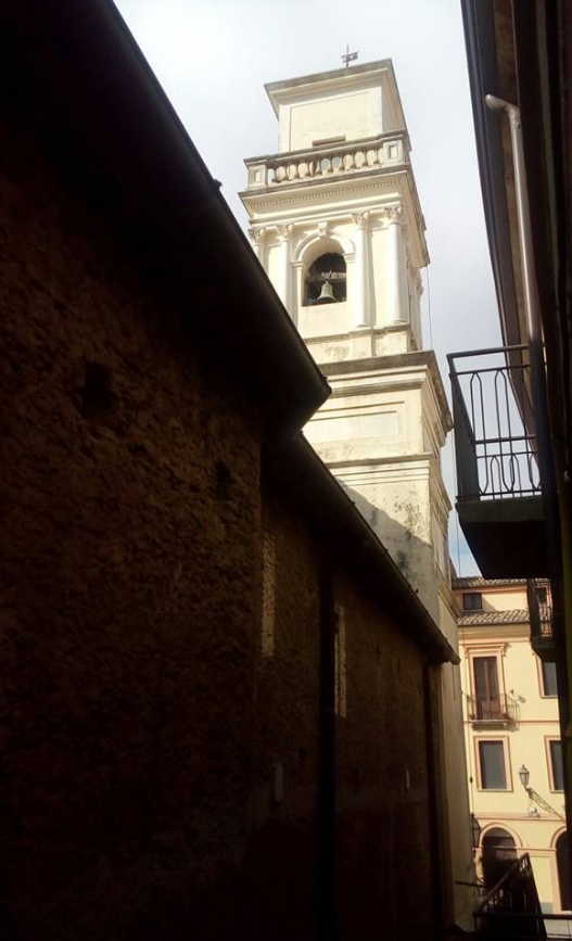 Girifalco, campanile della Chiesa di San Rocco